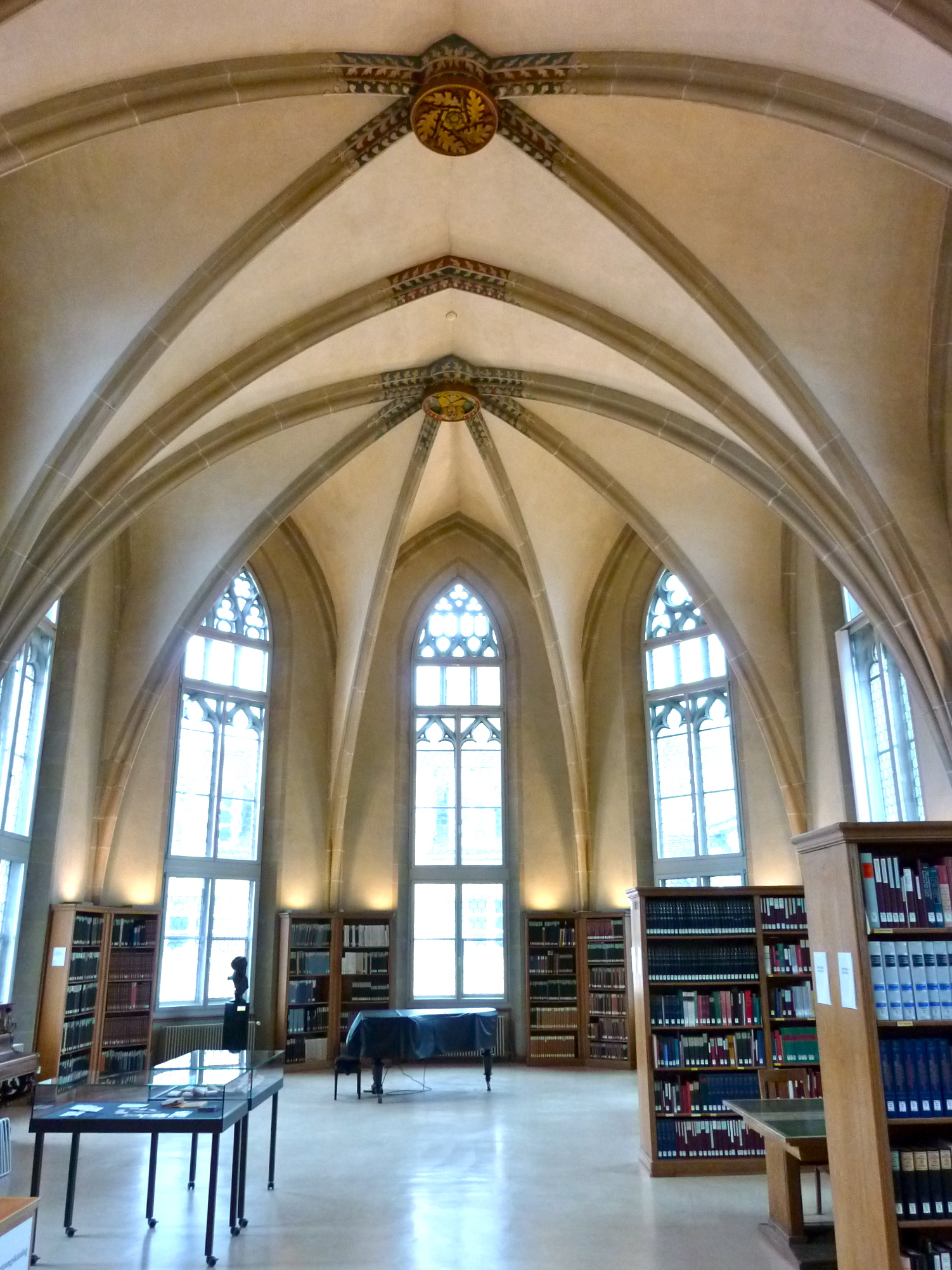 Chor der alten Predigerkirche, heute Musikaliensammlung der Zentralbibliothek Zürich